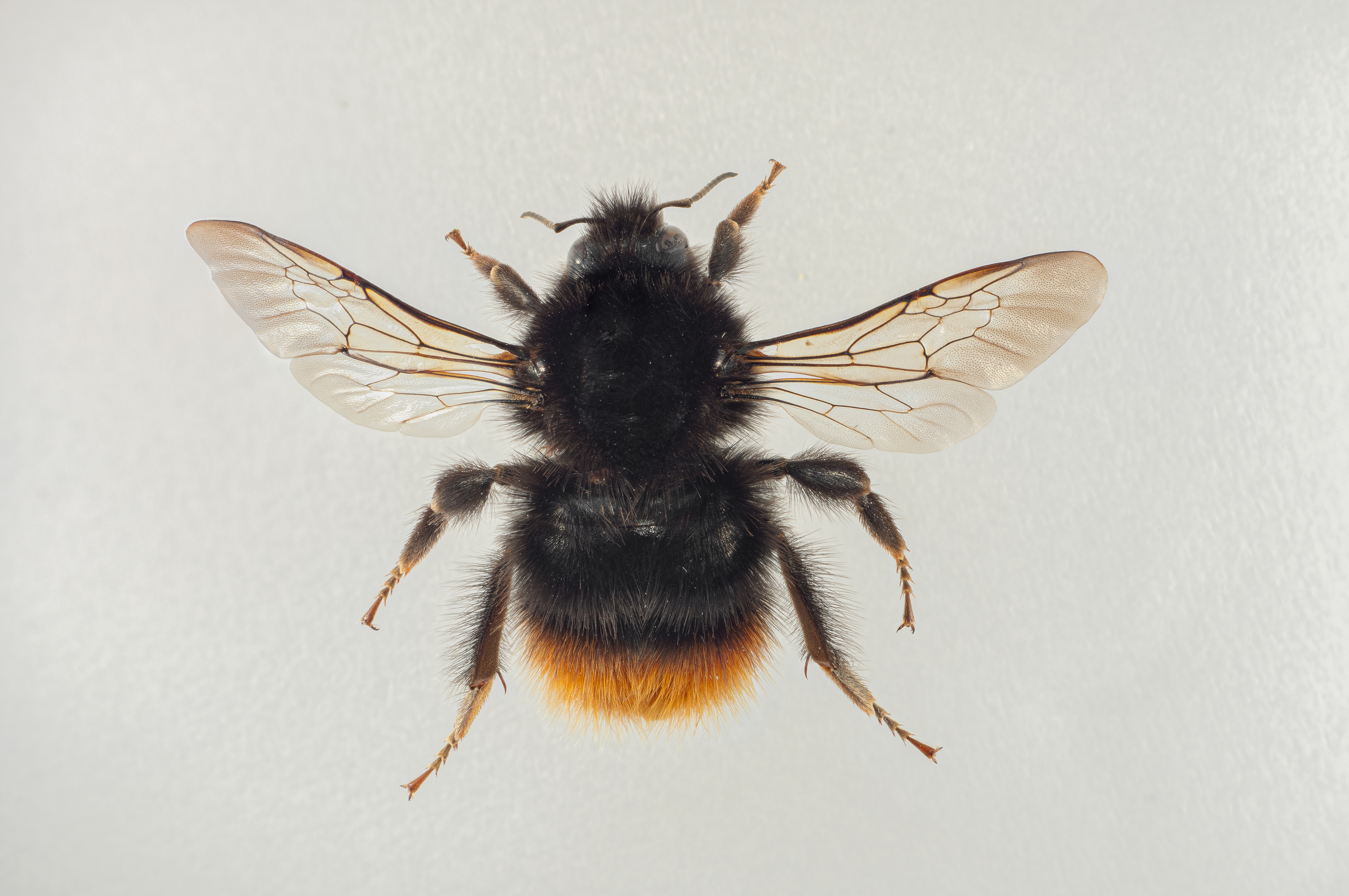 Tjuvhumle (Bombus wurflenii)